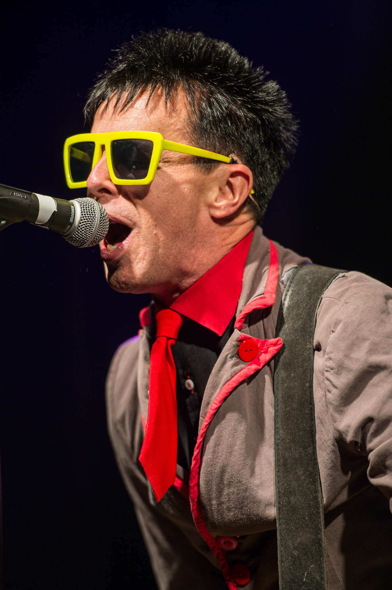 Concertbüro Franken,Der Hirsch,Konzert,Livekonzert,Livemusik,Michael "Olga" Algar,Musik,Toy Dolls